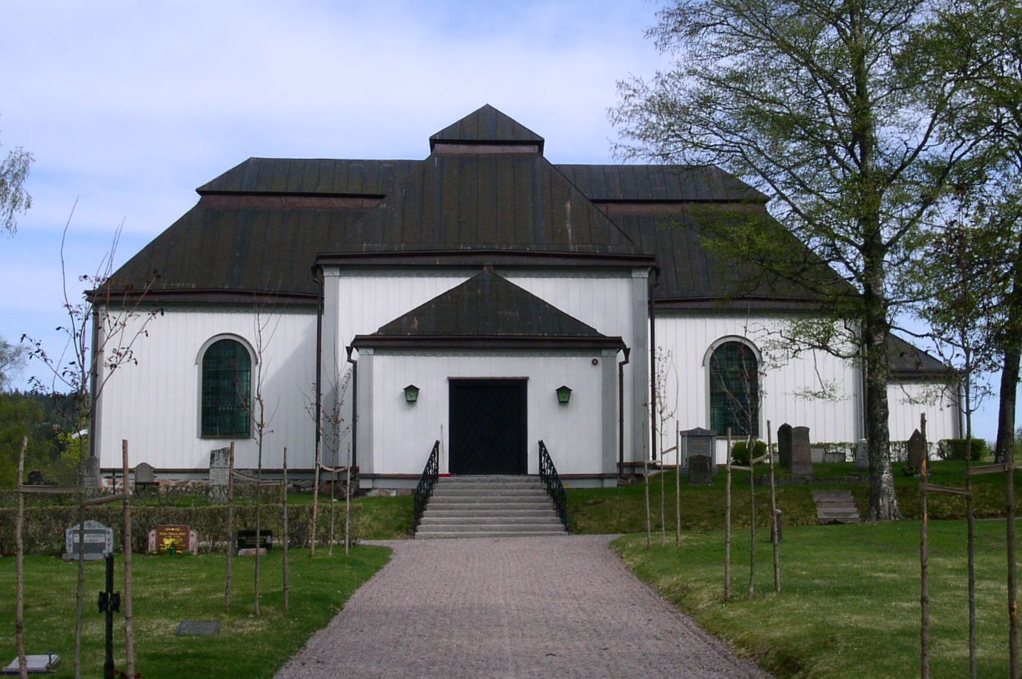 Säfsnäs Kyrka (Church), Dalarna, Sweden